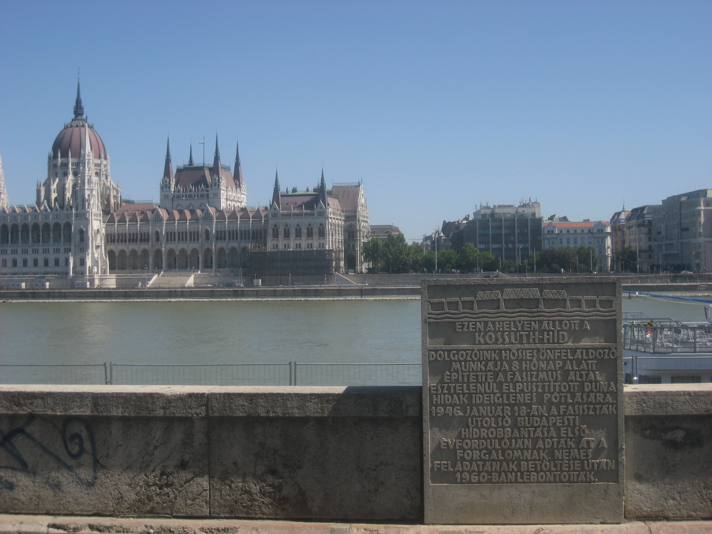 Gedenkstein für die ehemalige Kossuth híd in Budapest